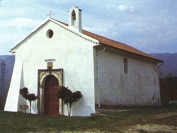 San Giovanni in Fiore - Monastero dei tre Fanciulli